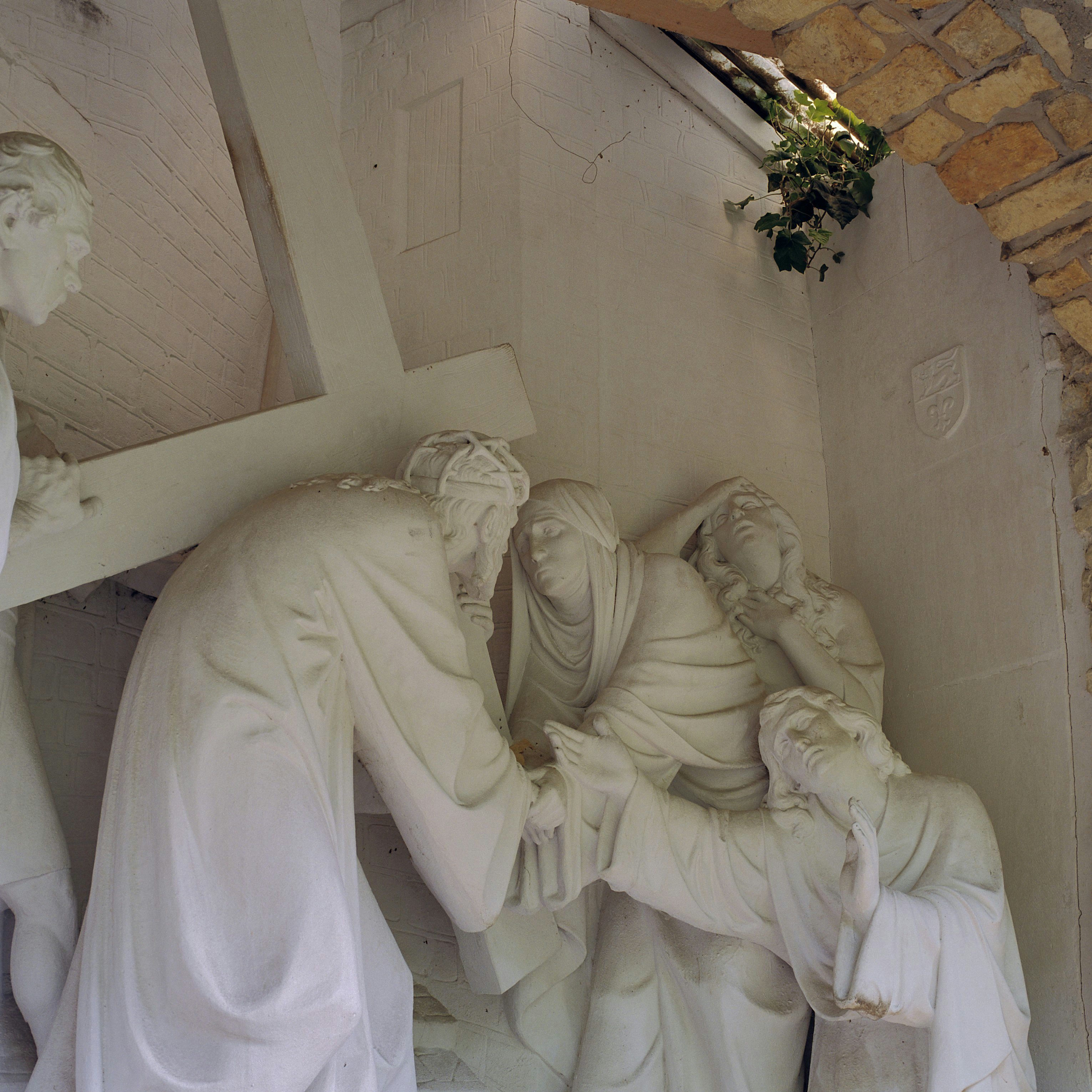 Processiepark: Detail kruiswegstatie. Rechts: wapen op de witte zijmuurtje